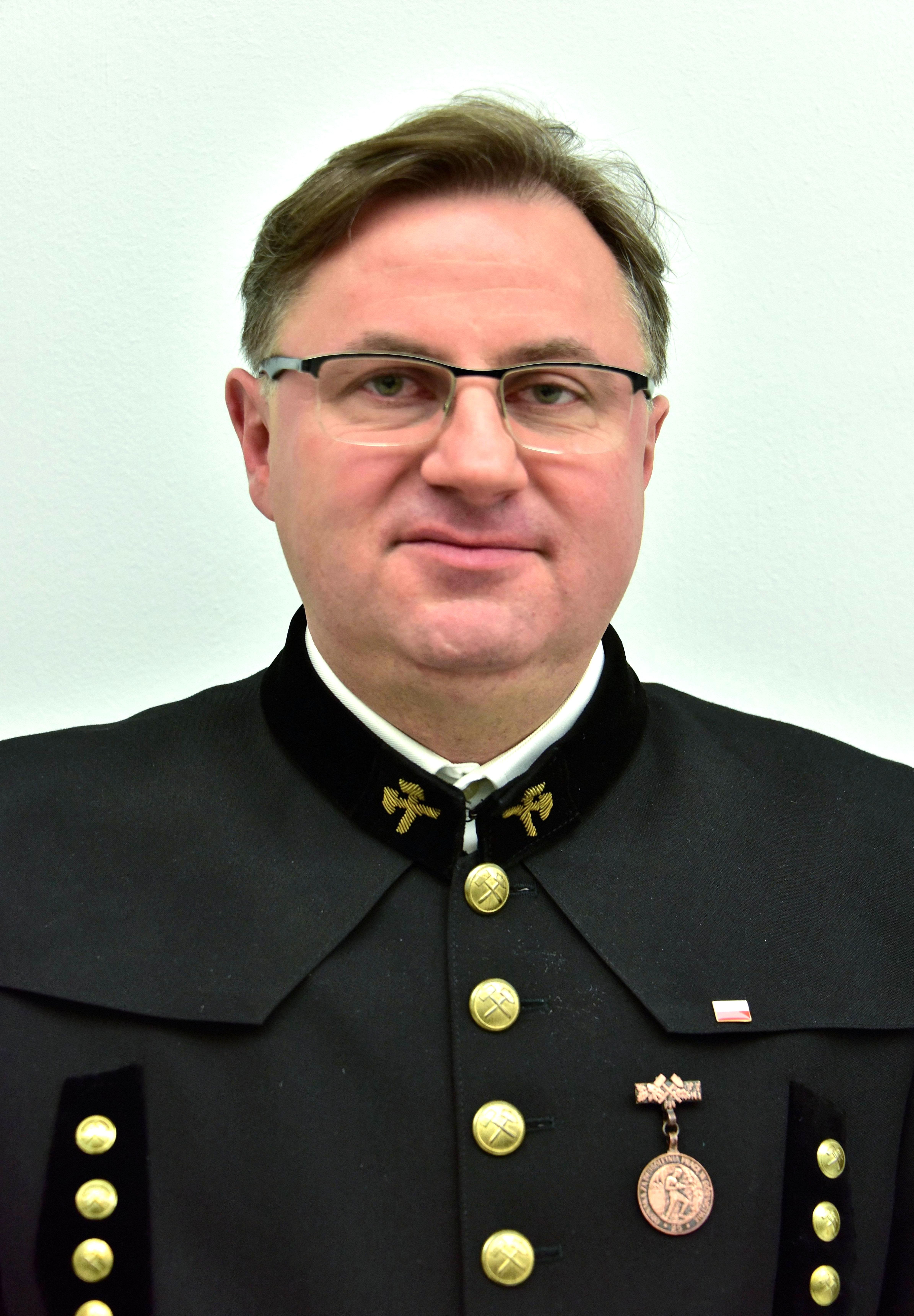 Poseł Jarosław Gonciarz w Sejmie